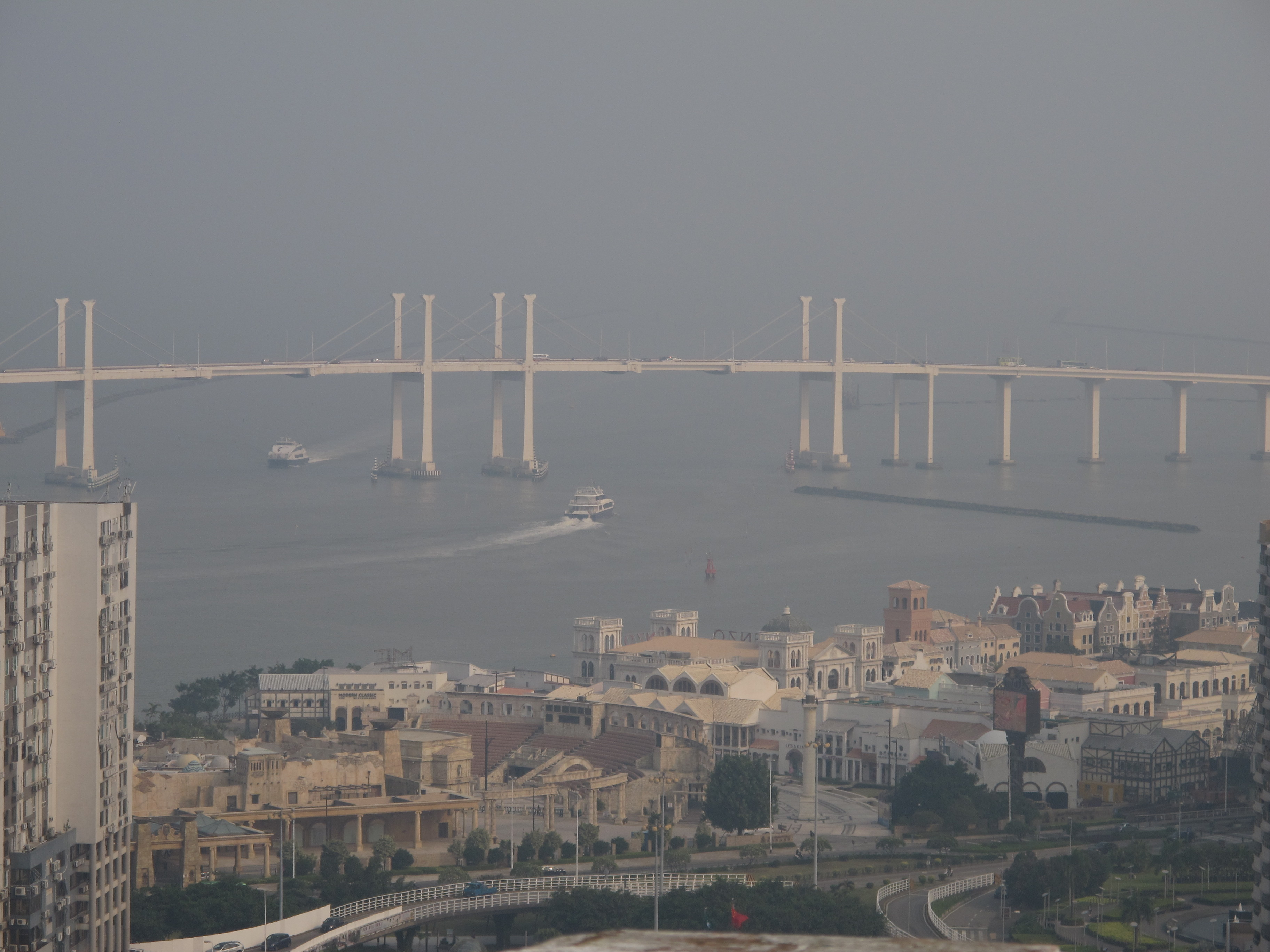 喷射飞航从港澳码头开出穿过友谊大桥